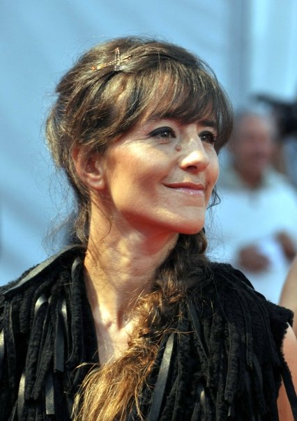 Romane Bohringer au festival de Deauville 2009